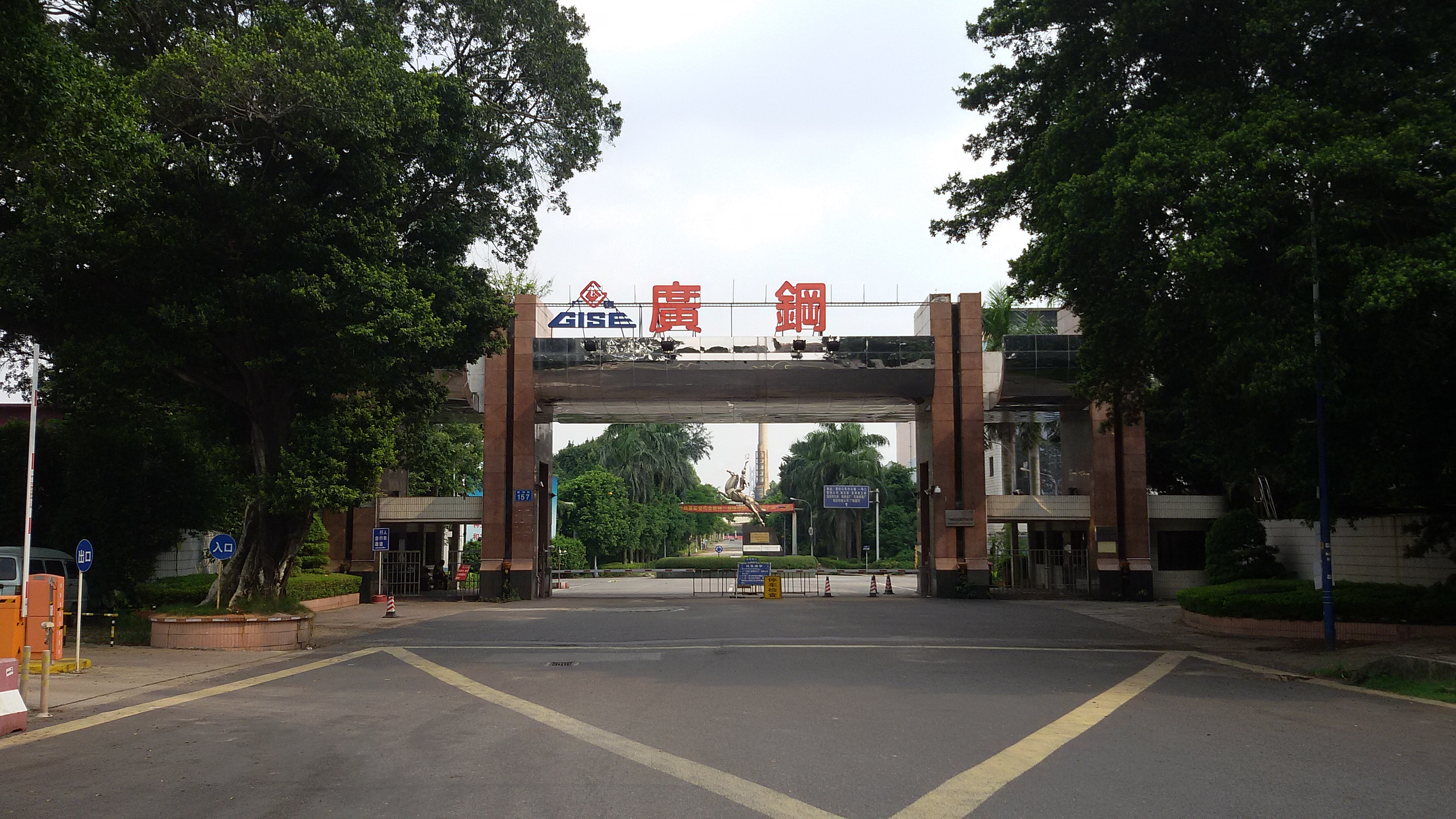 粵語: 廣鋼（白鶴洞地區）嘅正門